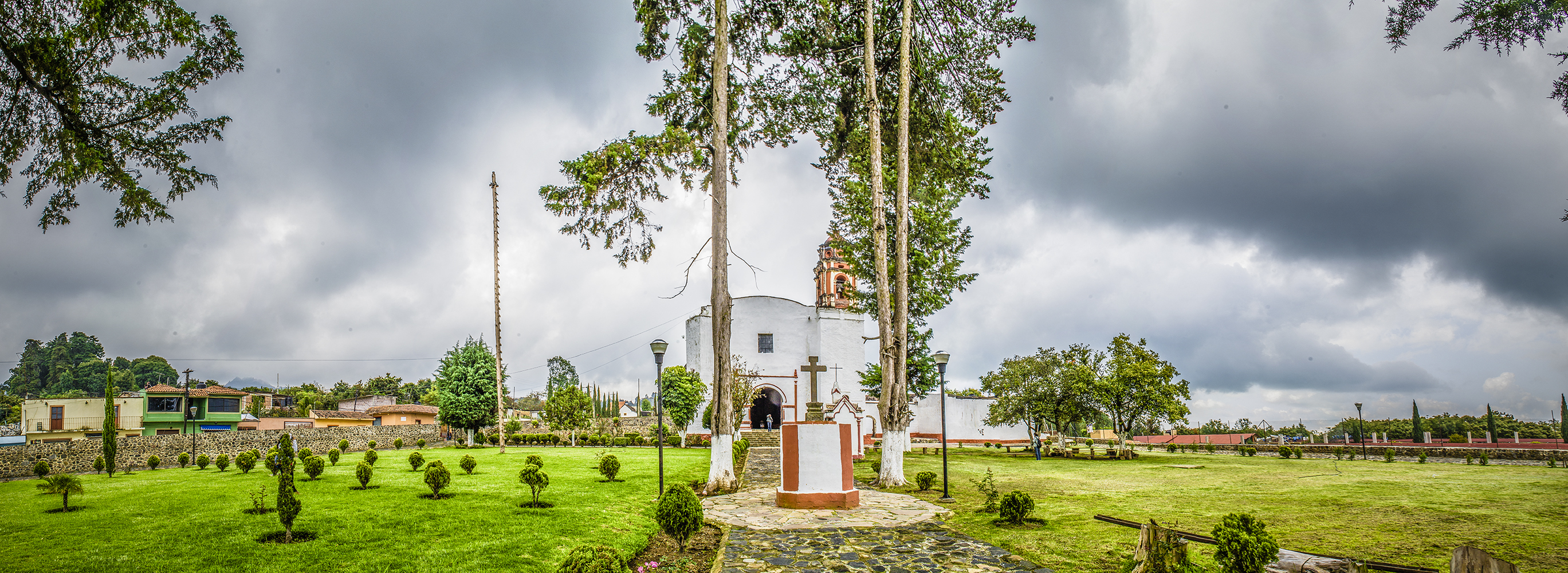 Templo y Ex Convento de Santo Domingo